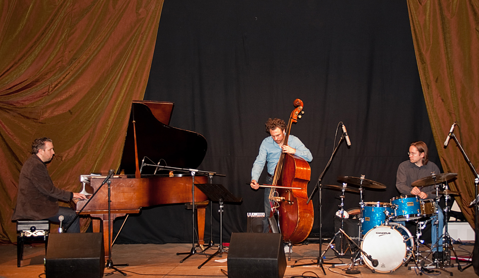 Sebastian Gahler (* 1978) ist ein deutscher Jazzpianist und -komponist. Mit dem Bassisten Nico Brandenburg (Mitte) und dem Schlagzeuger René Marx (rechts) gründete er 2003 das Sebastian Gahler Trio, dessen Album Meditation mit eigenen Kompositionen Gahlers Anfang 2009 in der Reihe Jazz thing Next Generation bei Double Moon erschien.